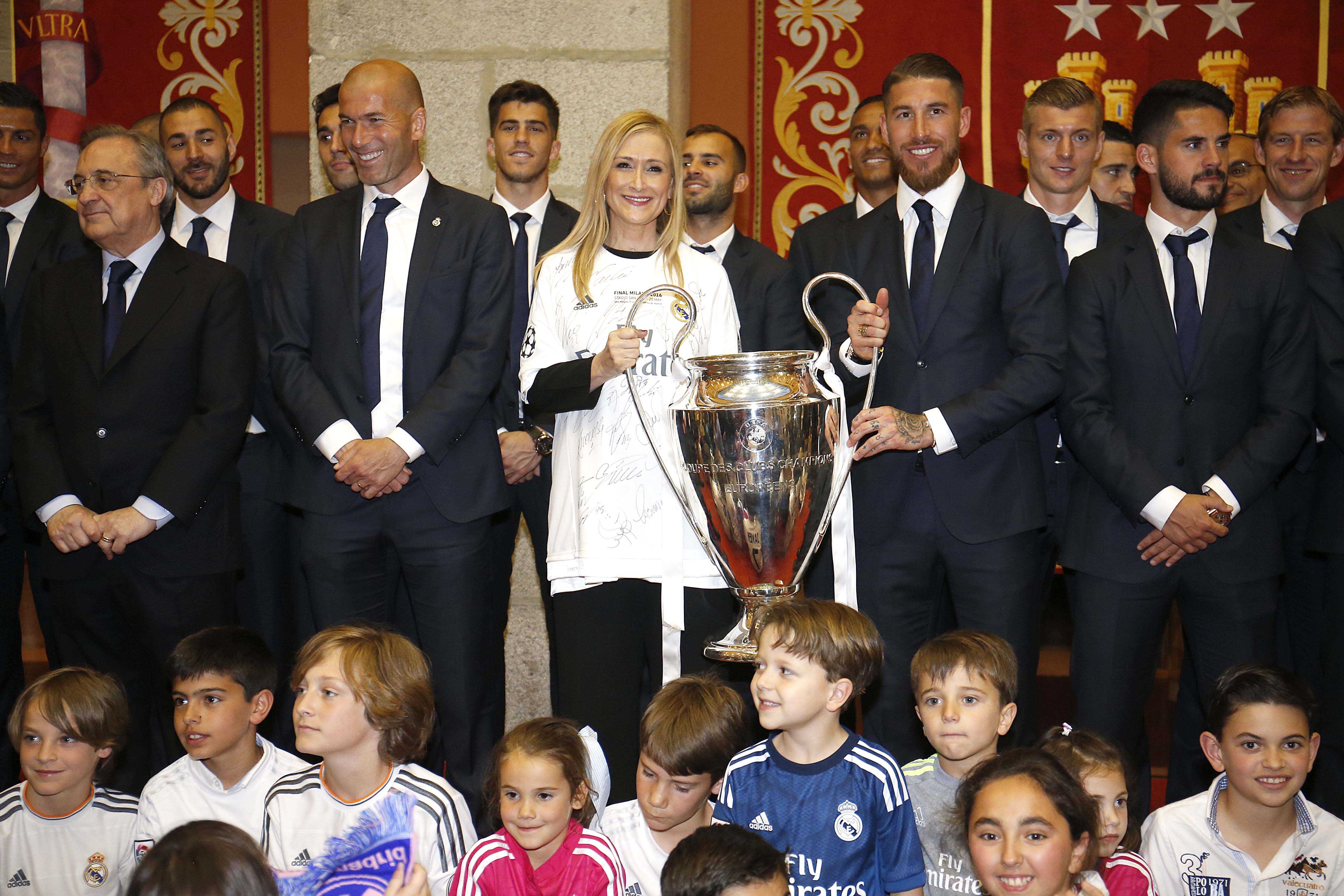 La undécima ya está en la Puerta del Sol. Un gran victoria del Real Madrid, que tuvo enfrente un gran rival, el Atlético de Madrid. Enhorabuena a los dos, enhorabuena Madrid! 🏆⚽